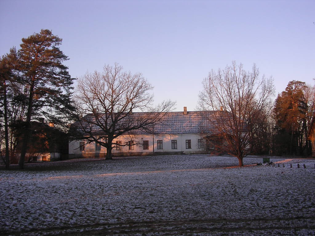 Käravete mõisahoone